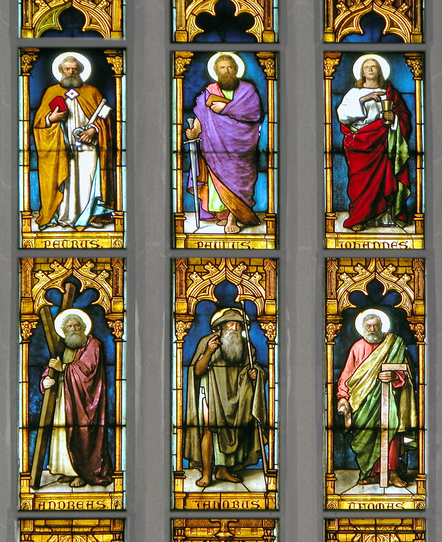 18.04.2011 04774 Dahlen (Sachsen), Kirchstraße (GMP: 51.364957,13.000966): Stadtkirche Unserer Lieben Frauen. Altar mit spätgotischen Schnitzfiguren um 1520 vom Meister des Döbelner Hochaltars, im Altarschrein von 1863 aufgestellt. Die Bleiverglasung der Chorfenster fertigte die Dresdner Glasma lereiwerkstatt Anemüllers Nachfahren 1895 an. [DSCNn2345.TIF]20110418530DR.JPG(c)Blobelt